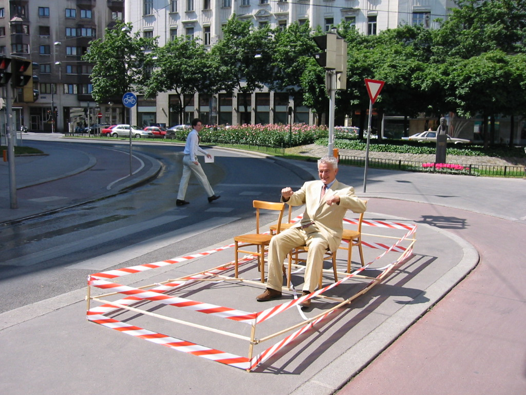 Das Gehzeug, eine Karikatur des enormen unnötigen Platzbedarfs des motorisierten Individualverkehrs